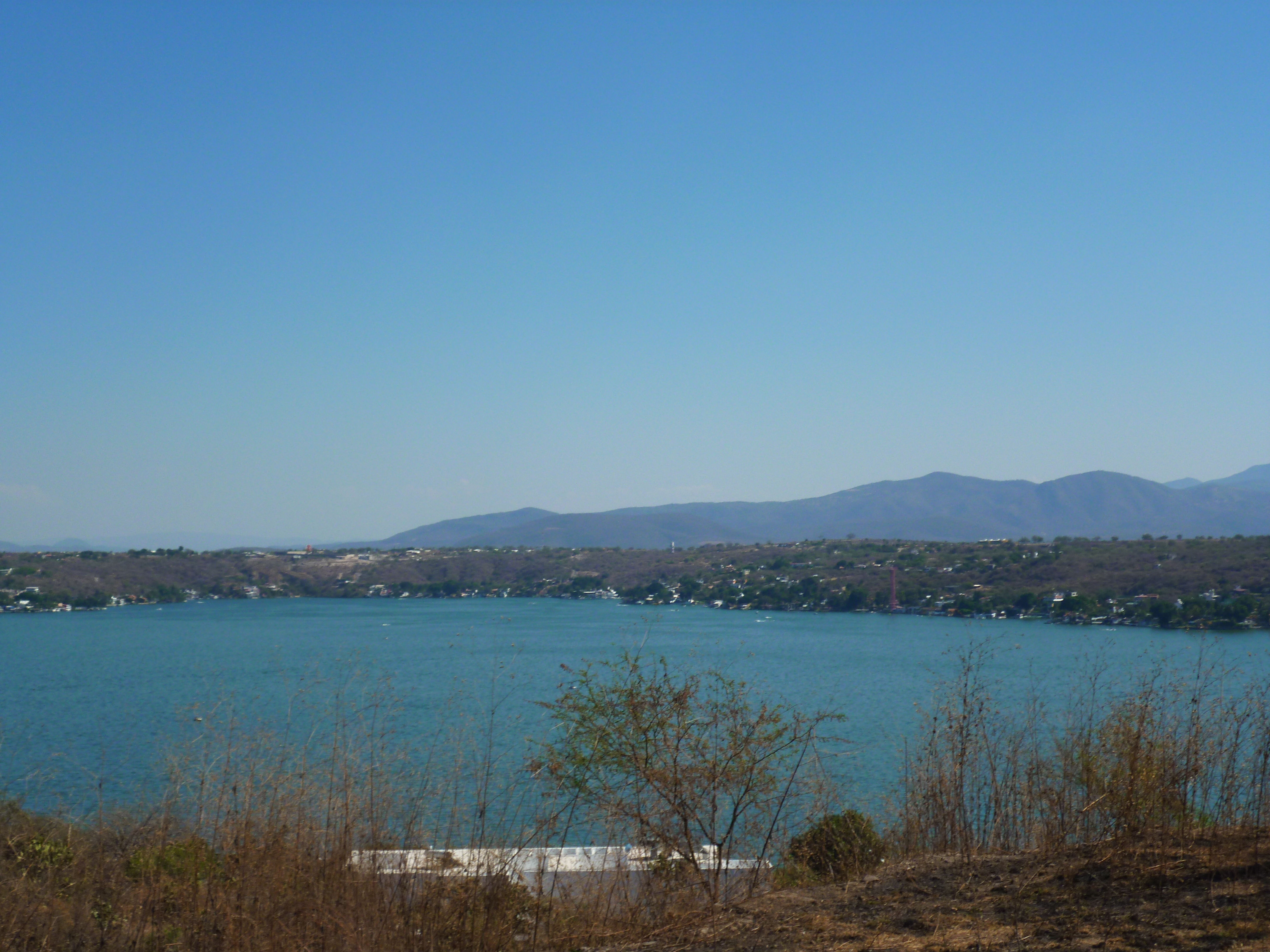 Laguna y algunos arbustos encontrados en Tequesquitengo, Morelos, México. Esta fotografía muestra una vista desde una parte elevada de la montaña que la rodea.